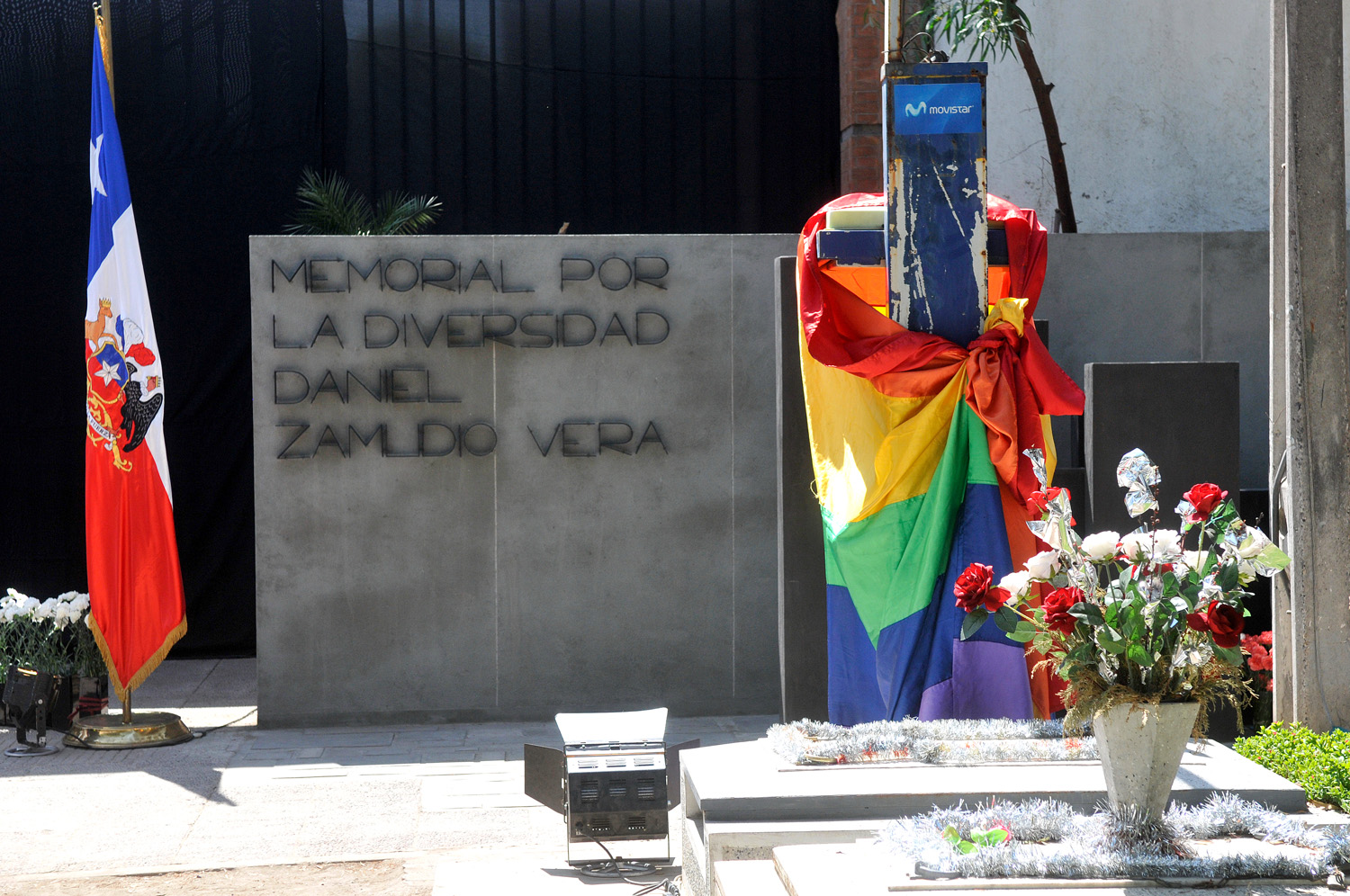 Inauguración Memorial por la Diversidad Daniel Zamudio Vera Inauguración del Memorial por la Diversidad en honor a Daniel Zamudio Vera, en el Cementerio General de Santiago, Chile.